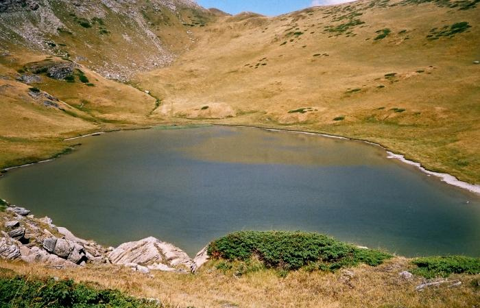 Белото Езеро на Шара